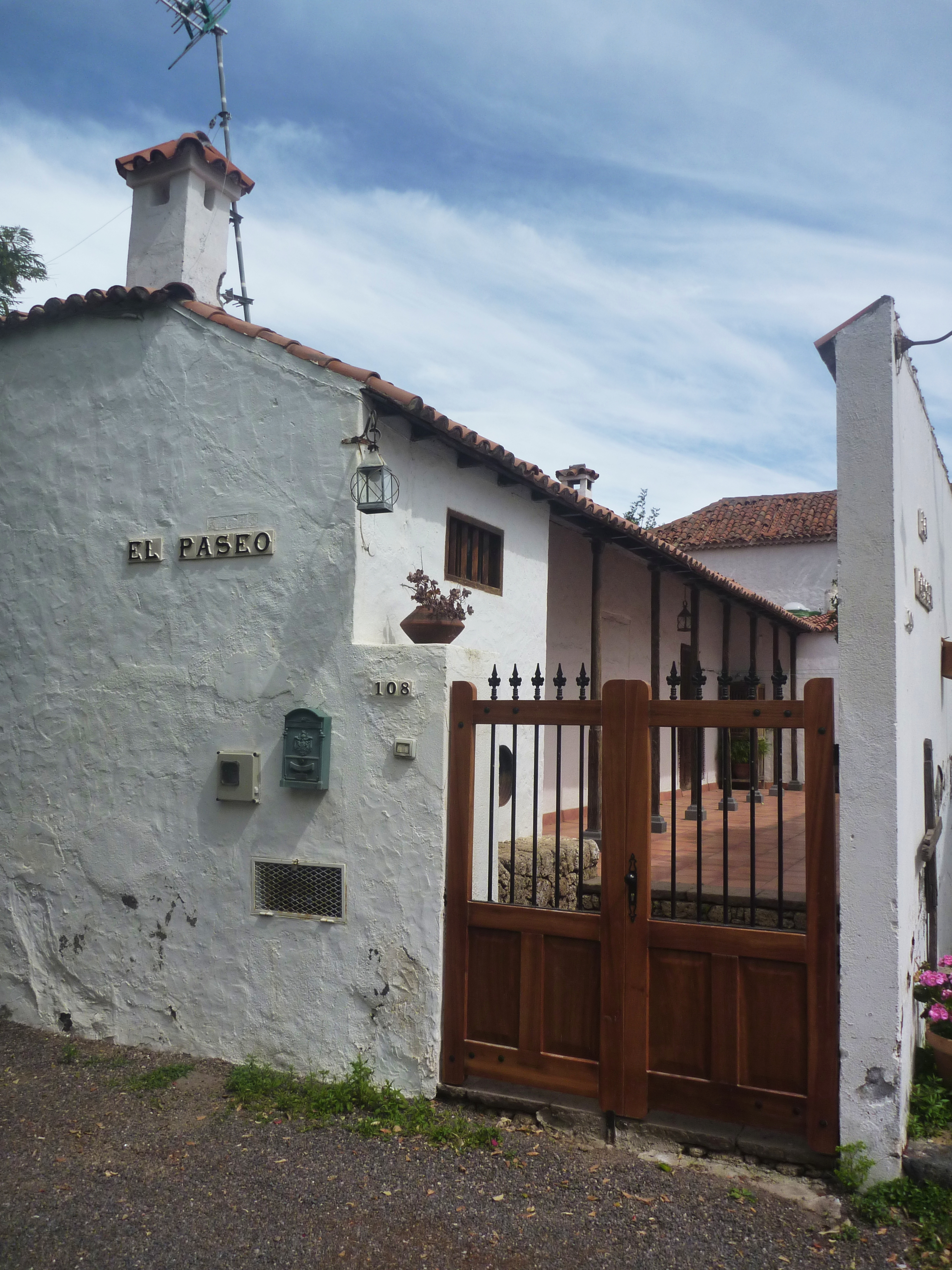 Casa tradicional en el Barrio de San Juan, Güímar, Tenerife. Vista desde el lado oeste que da a la Ermita de San Juan.